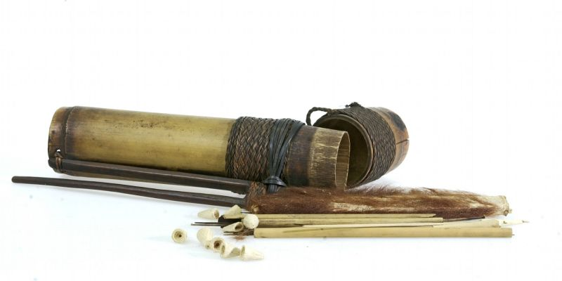 Pijlkoker. Koker met tien vergiftigde blaaspijlen en een zakje van eekhoornvel met vijf vergiftigde blaaspijlen.. Bamboe koker met blaasroerpijltjes een stop en een gordelhaak